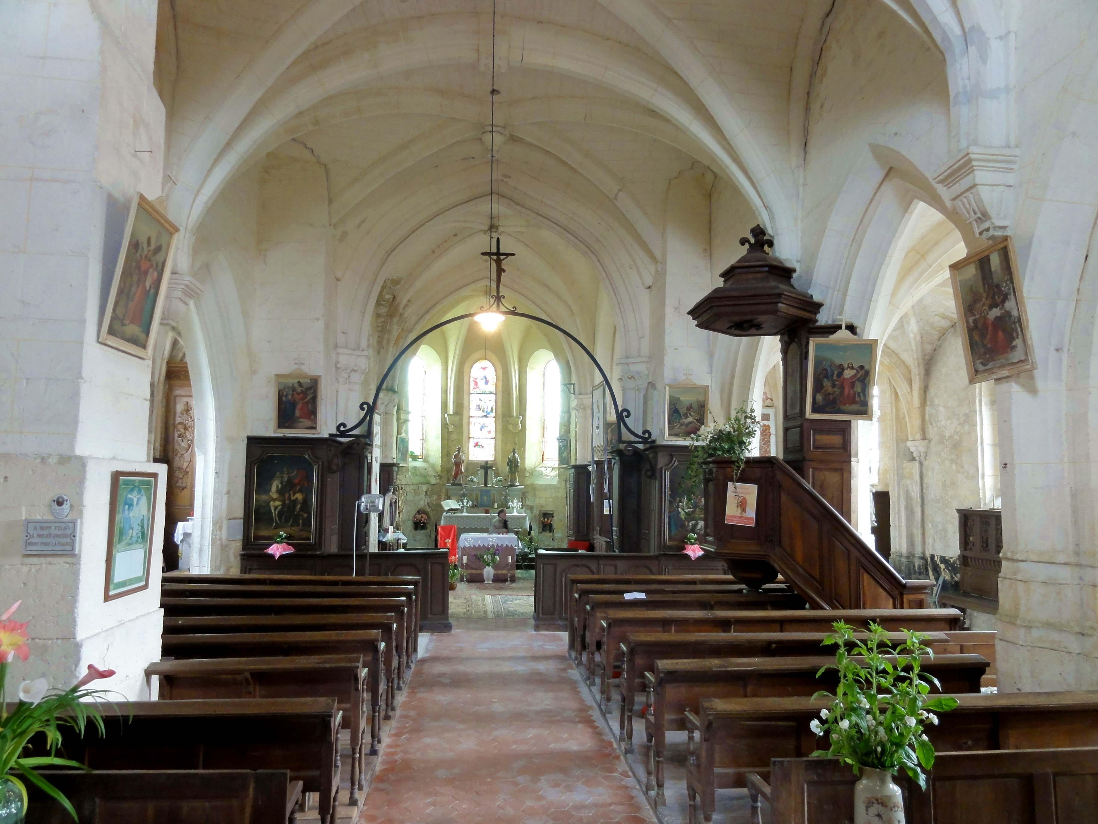 Intérieur de l'église - voir titre.